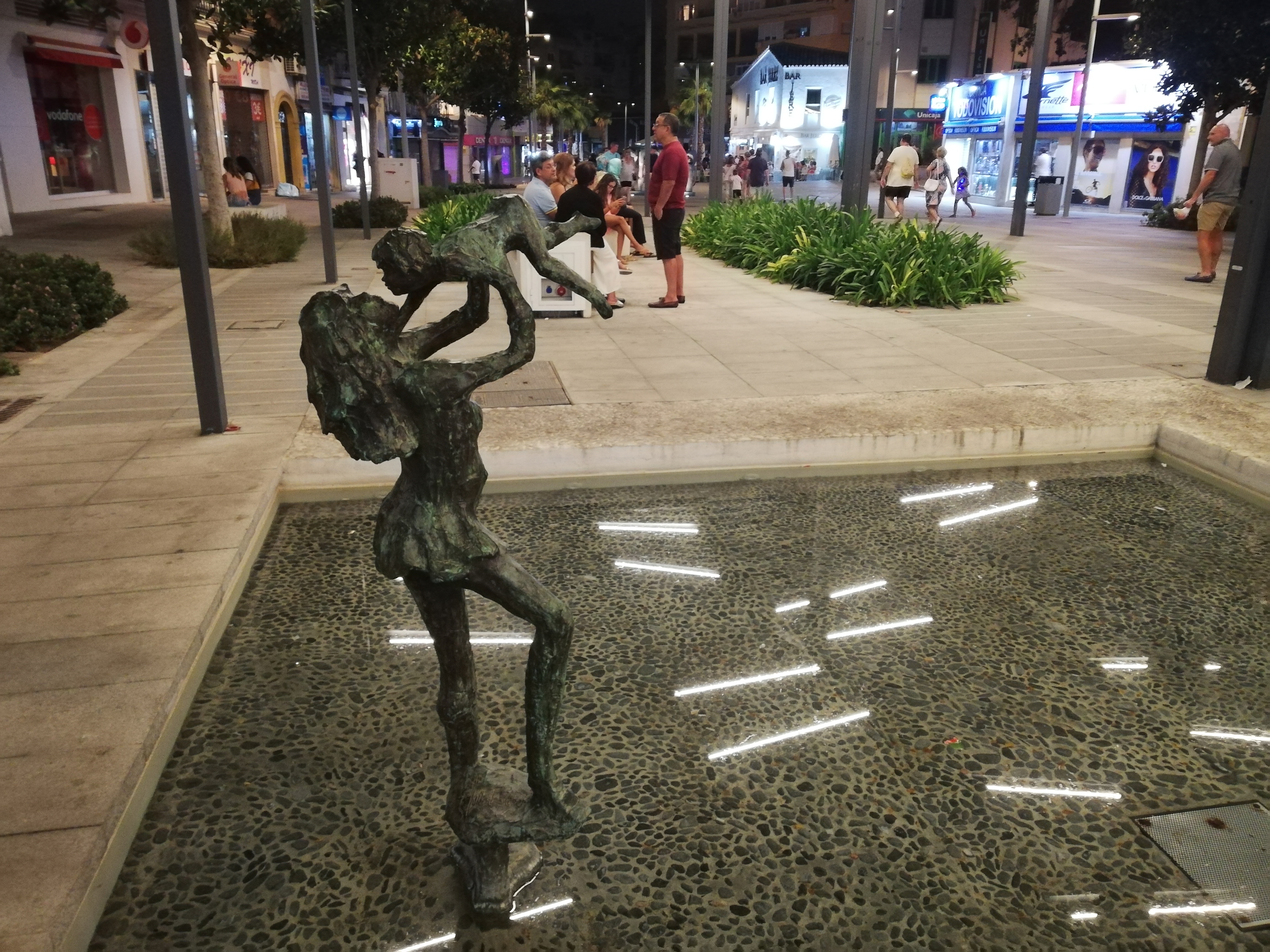 Escultura en una de las principales calles comerciales de Torremolinos